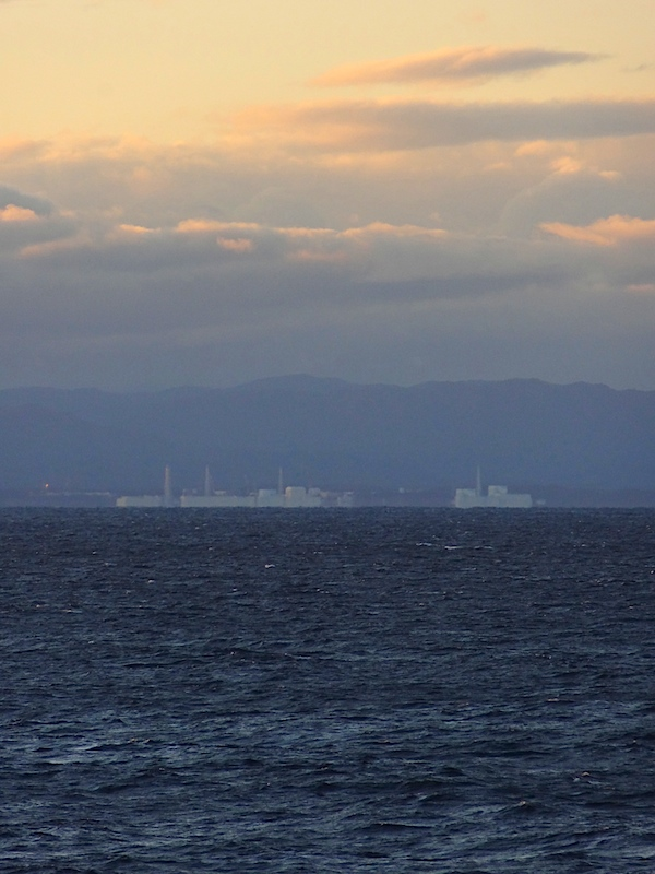 東京電力 福島第一原子力発電所 2011年11月21日 約30km離れた位置から撮影 （事故後、太平洋フェリー「いしかり」から）